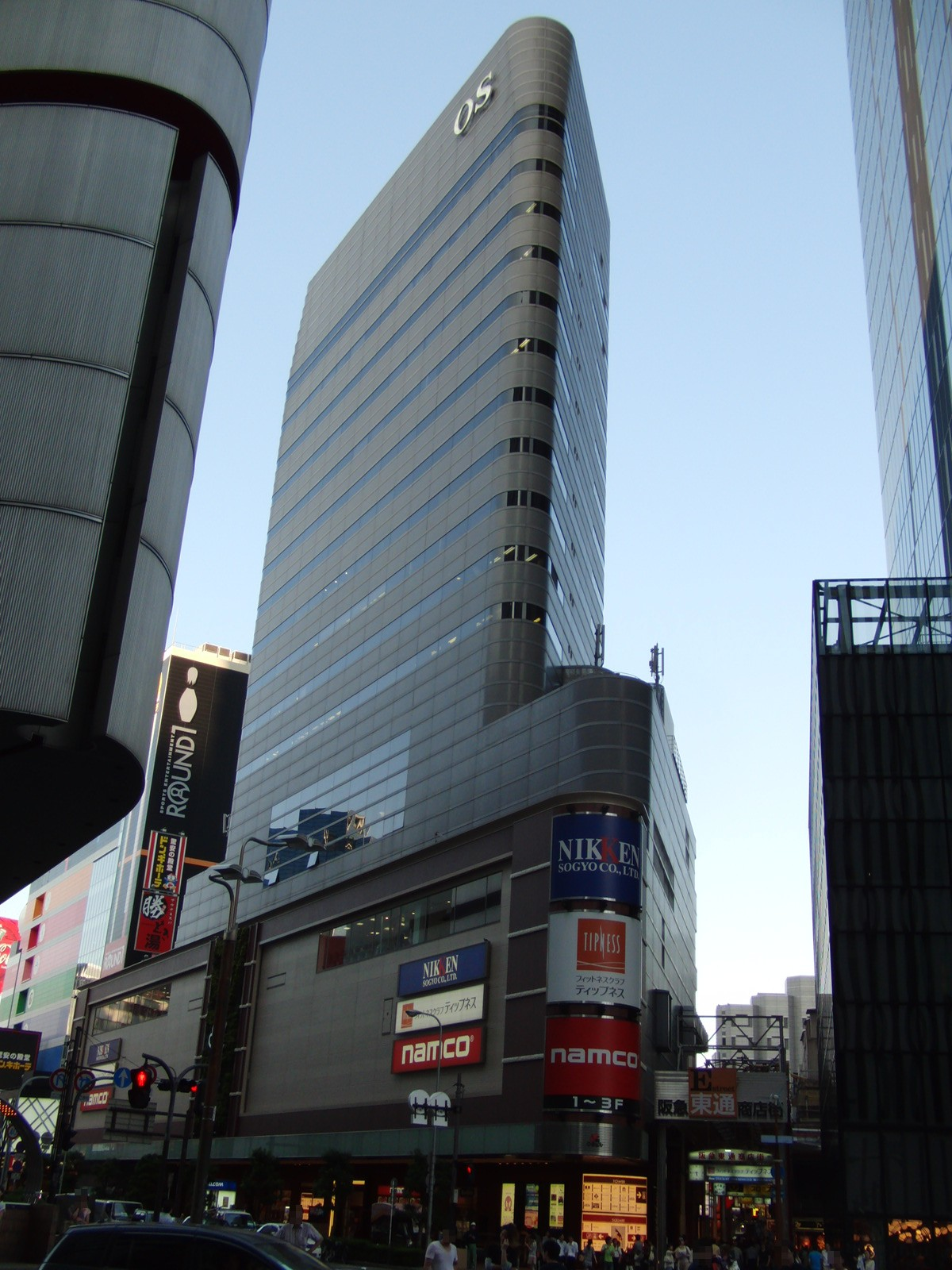 オーエス株式会社本店を撮影